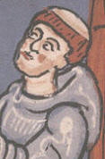 Arnold ze Citeaux